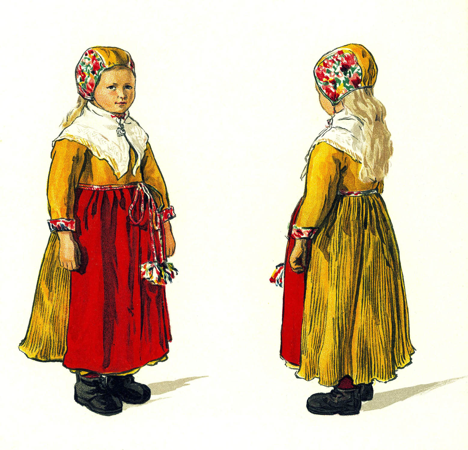 Folkdräkt, barn. "Sommarkolt för småkullor". Gagnefs socken, Dalarna. Bildtryck efter akvarell av Emelie von Walterstorff. (Sv. Folkdräkter pl. XX VII)